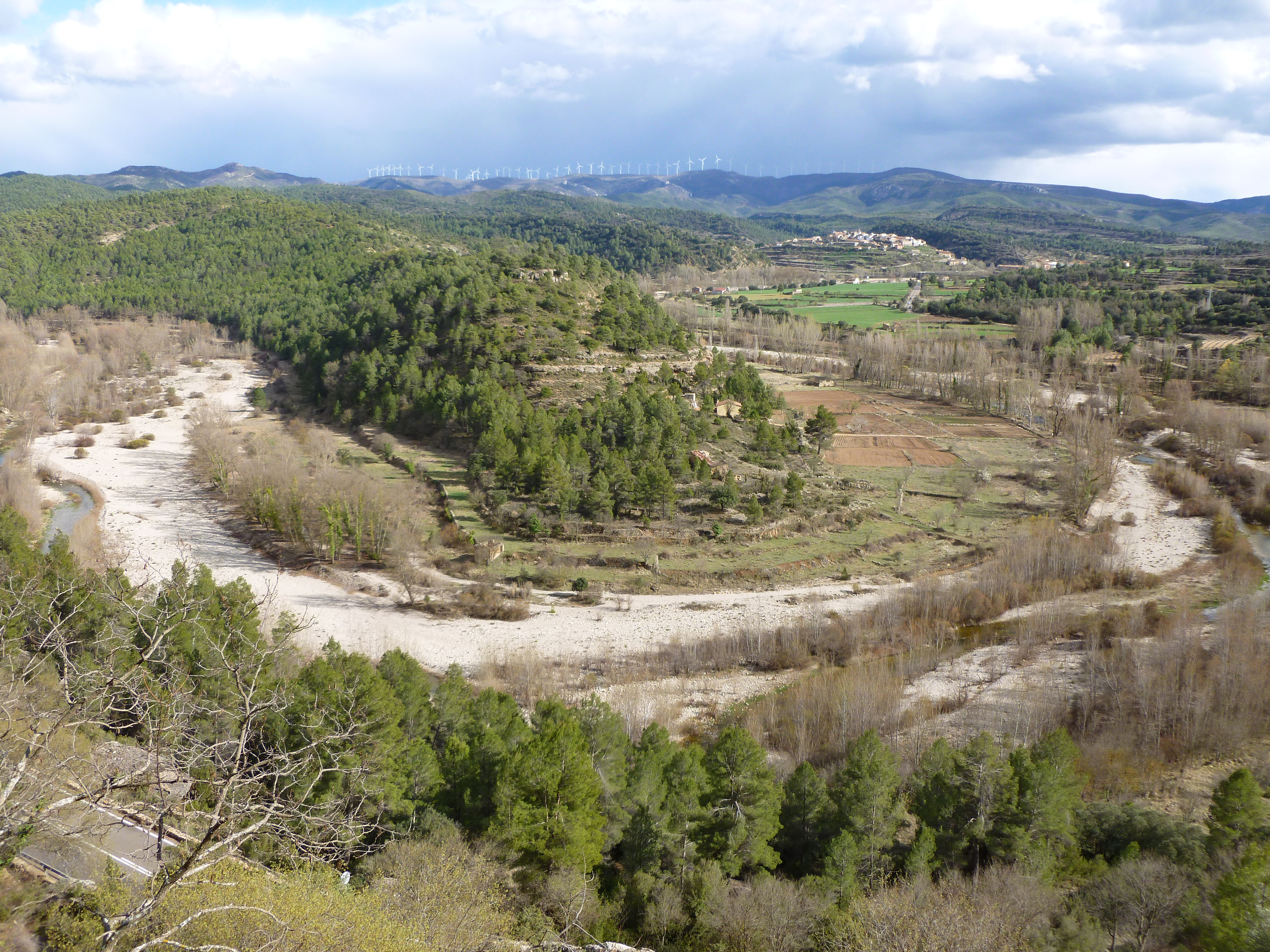 Meandro del río Bergantes frente al santuario de la Balma, en Zorita (Castellón, España) This is a photography of a Special Area of Conservation in Spain with the ID: ES5223029. Natura2000 entry, EEA entry